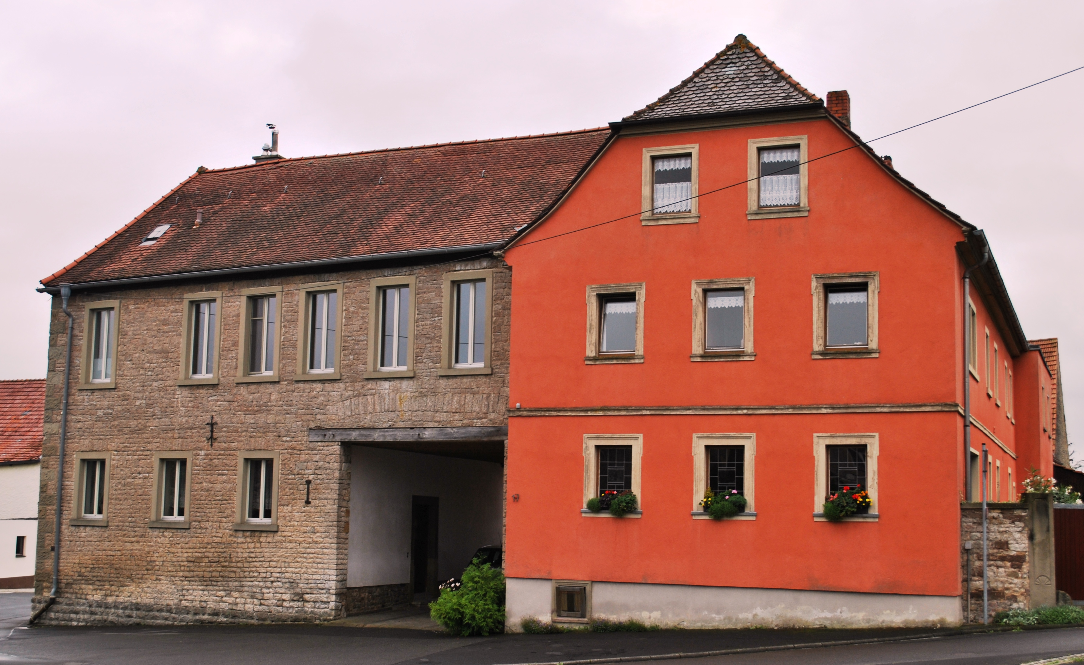 ehemaliges Gasthaus Zum Weißen Roß, Eichfeld